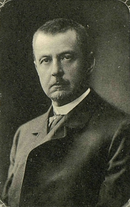 Князь Владимир Викторович Волконский, член Государственной думы от Волынской губернии.